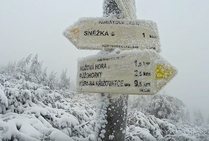 cesta na Sněžku 1602 m